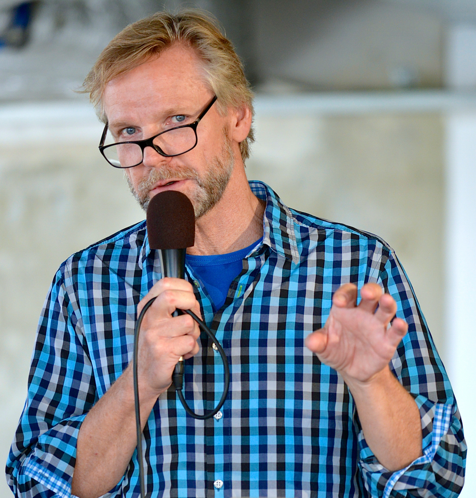 Tomas Ramberg i P1 Ekots Valspecial kommenterar frågorna inför valet. Plats: Kulturhuset Stadsteatern den 13 september 2014.